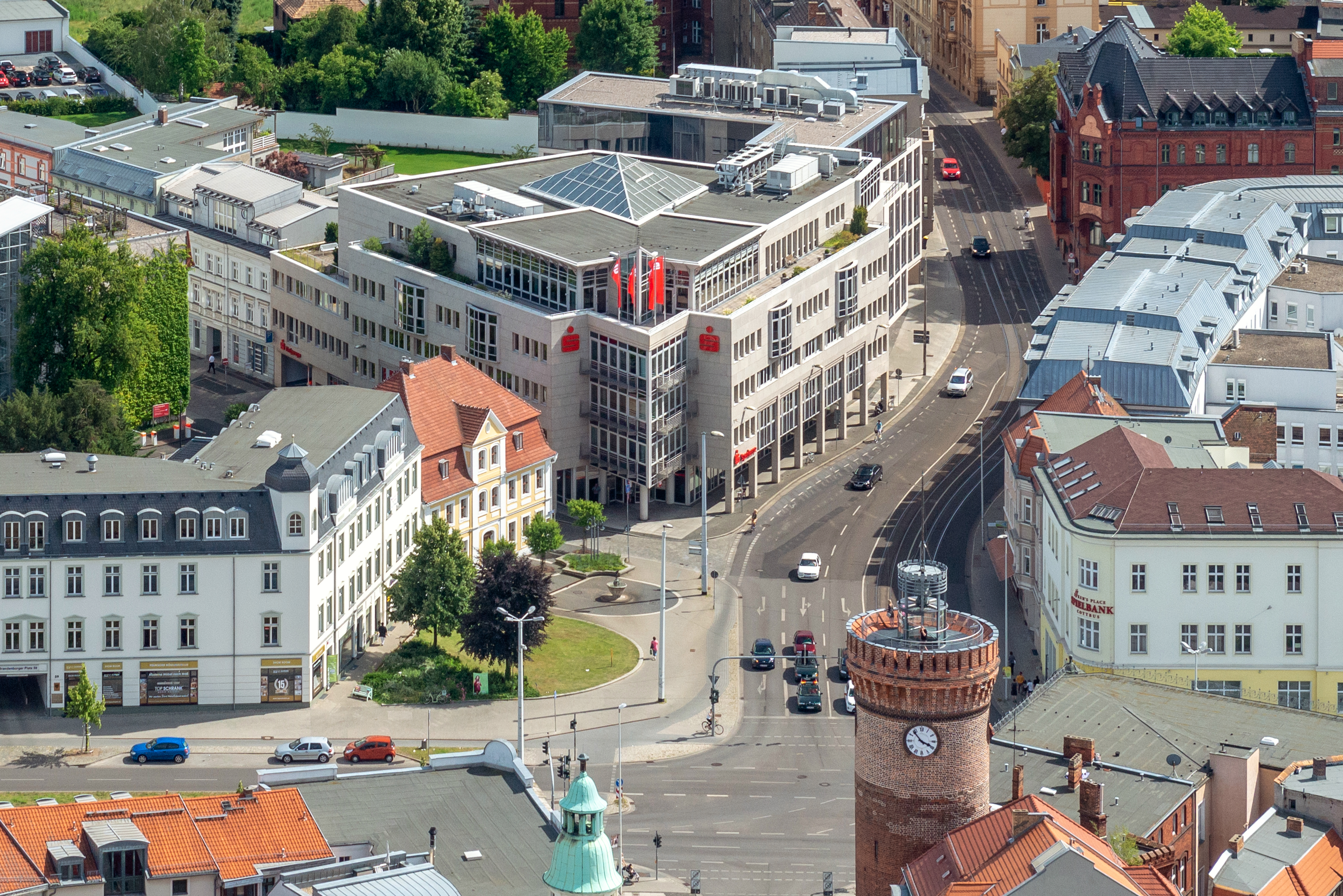 Ein Luftfoto der Sparkasse Spree-Neiße Hauptgeschäftsstelle